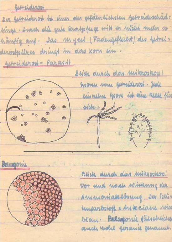 Seite aus dem Biologieheft von Marie-Luise Mack (Marlies Rethmeier), etwa 1944